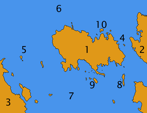 Vormsi a okolní ostrovy a poloostrovy.